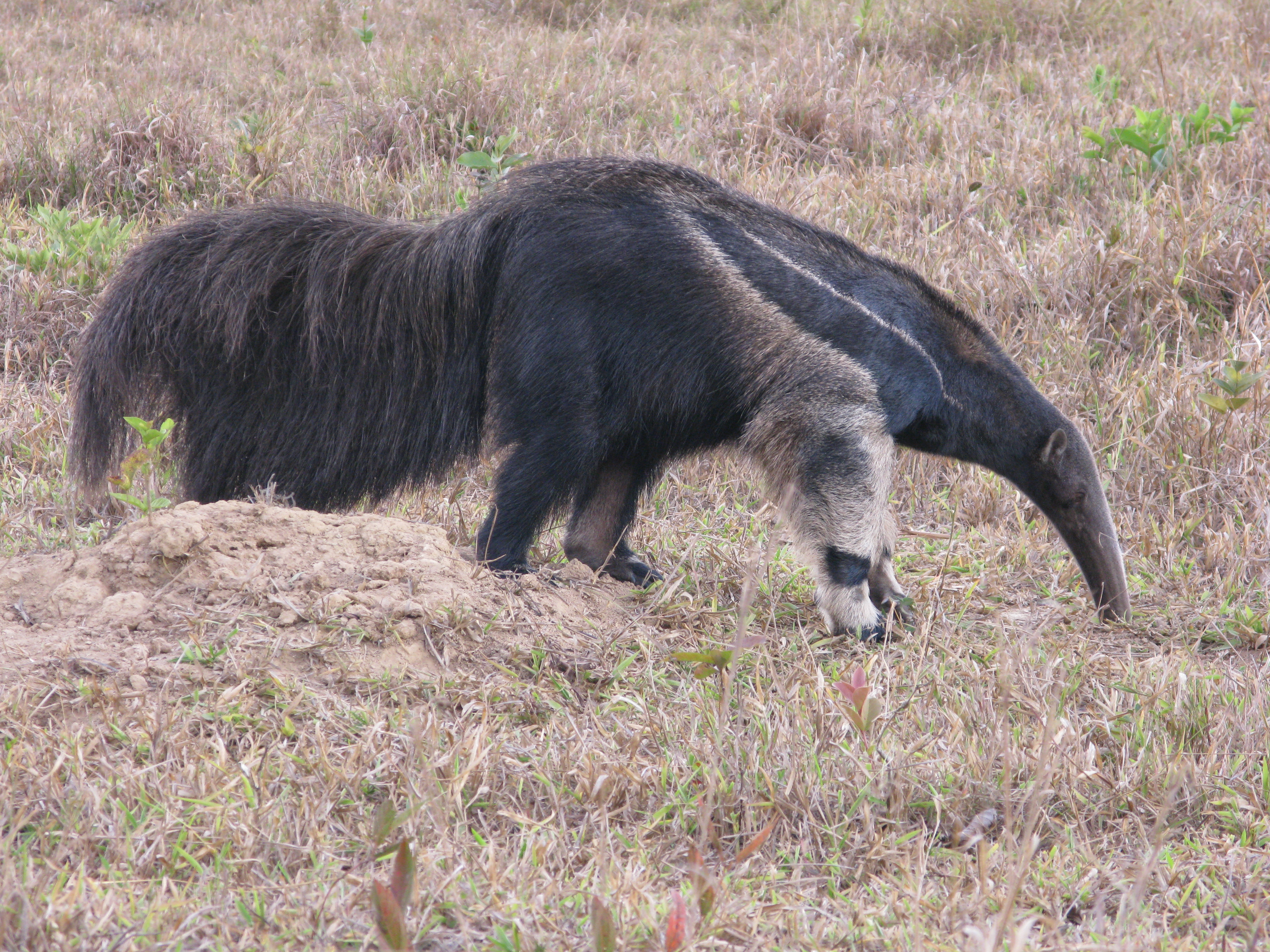 Serra da Canastra - Tamanduá